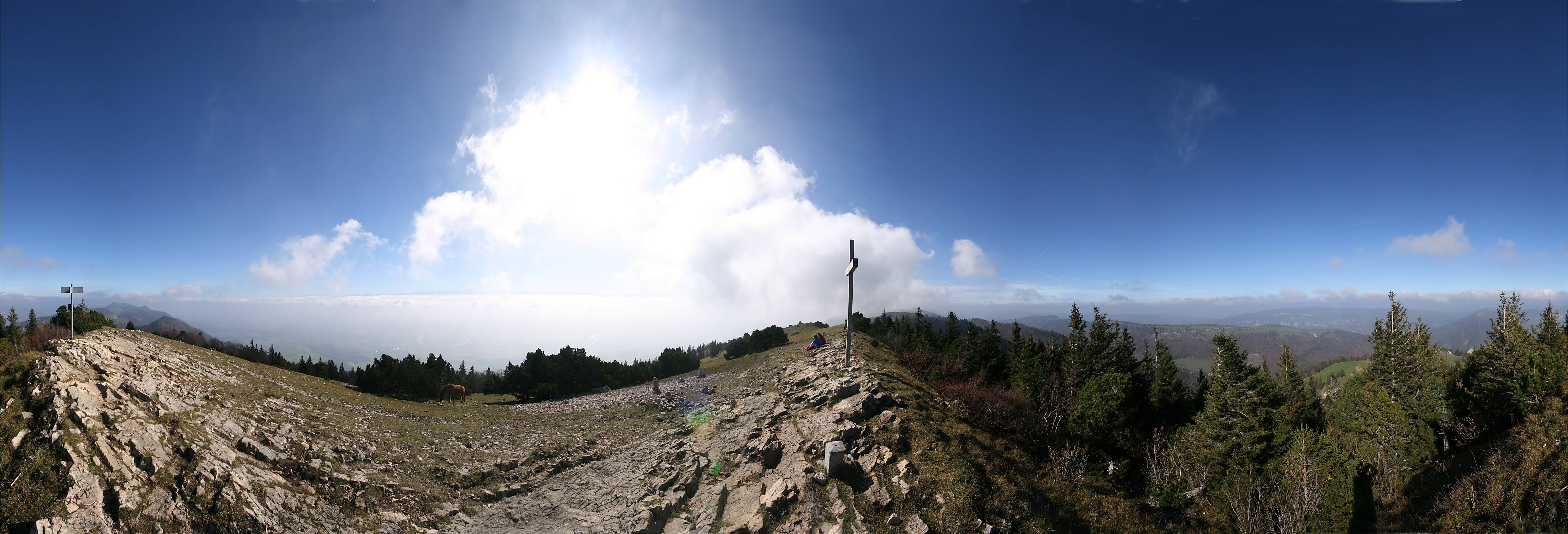 Hasenmatt, Kanton Solothurn, Schweiz